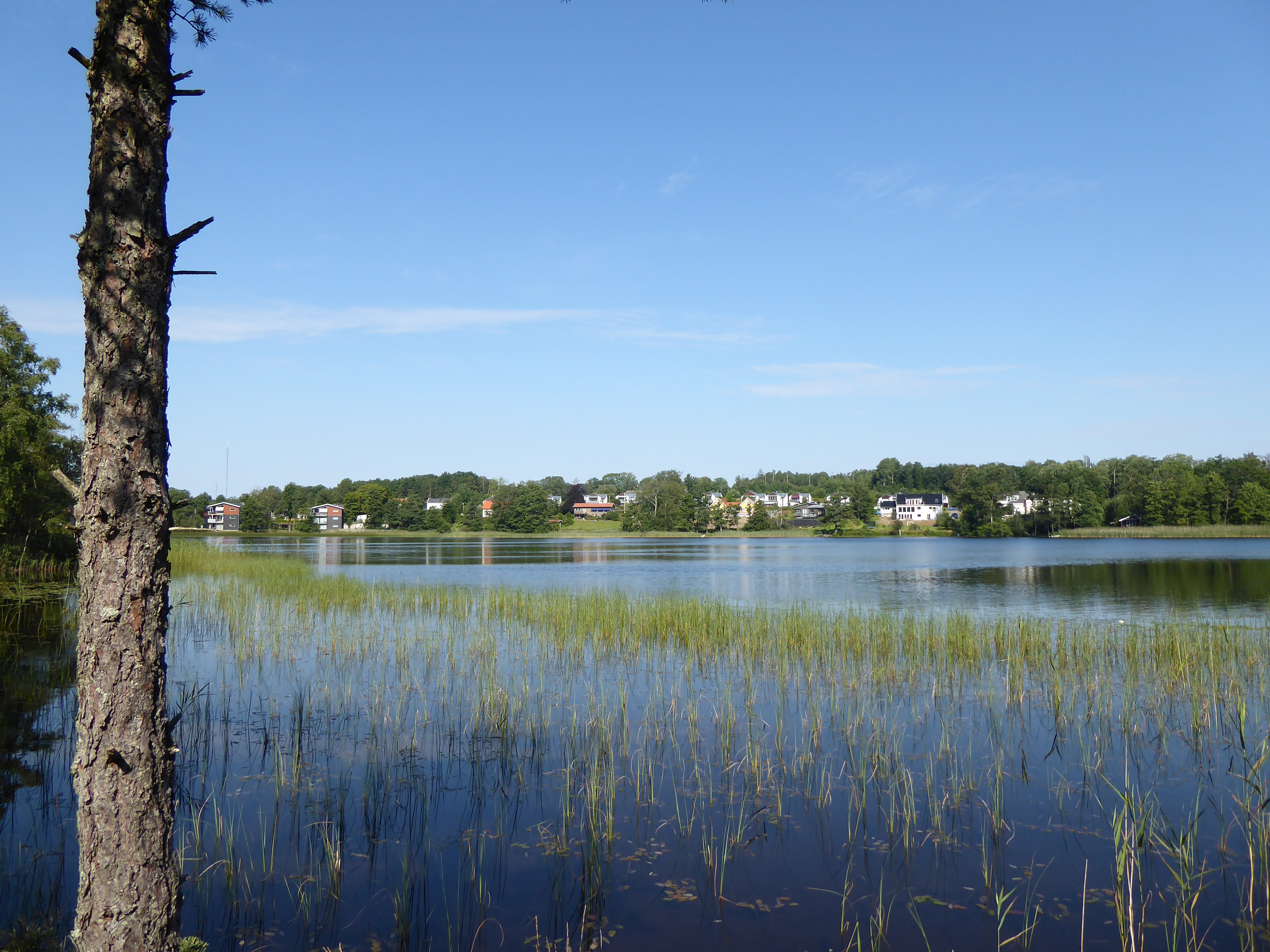 Stora Hålsjön (Västergötland, Sverige) från SE den 7 augusti 2020.